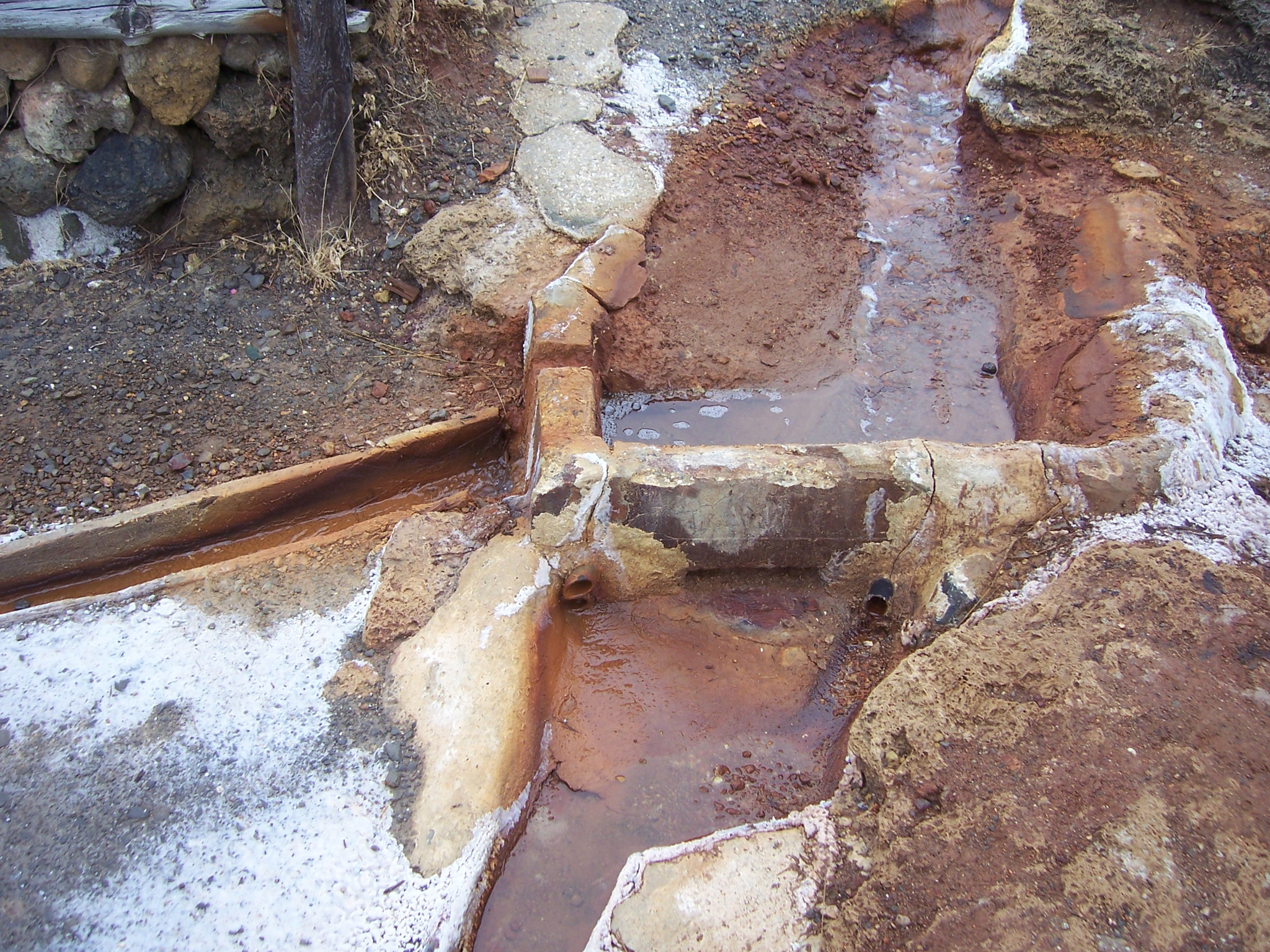 Partidero en Salinas de Añana